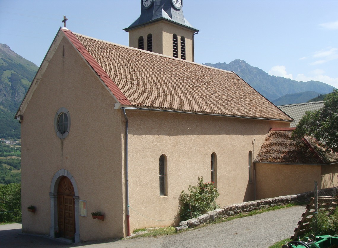 L'église de Beaufin, vue extérieure. Sur la droite, la sacristie.